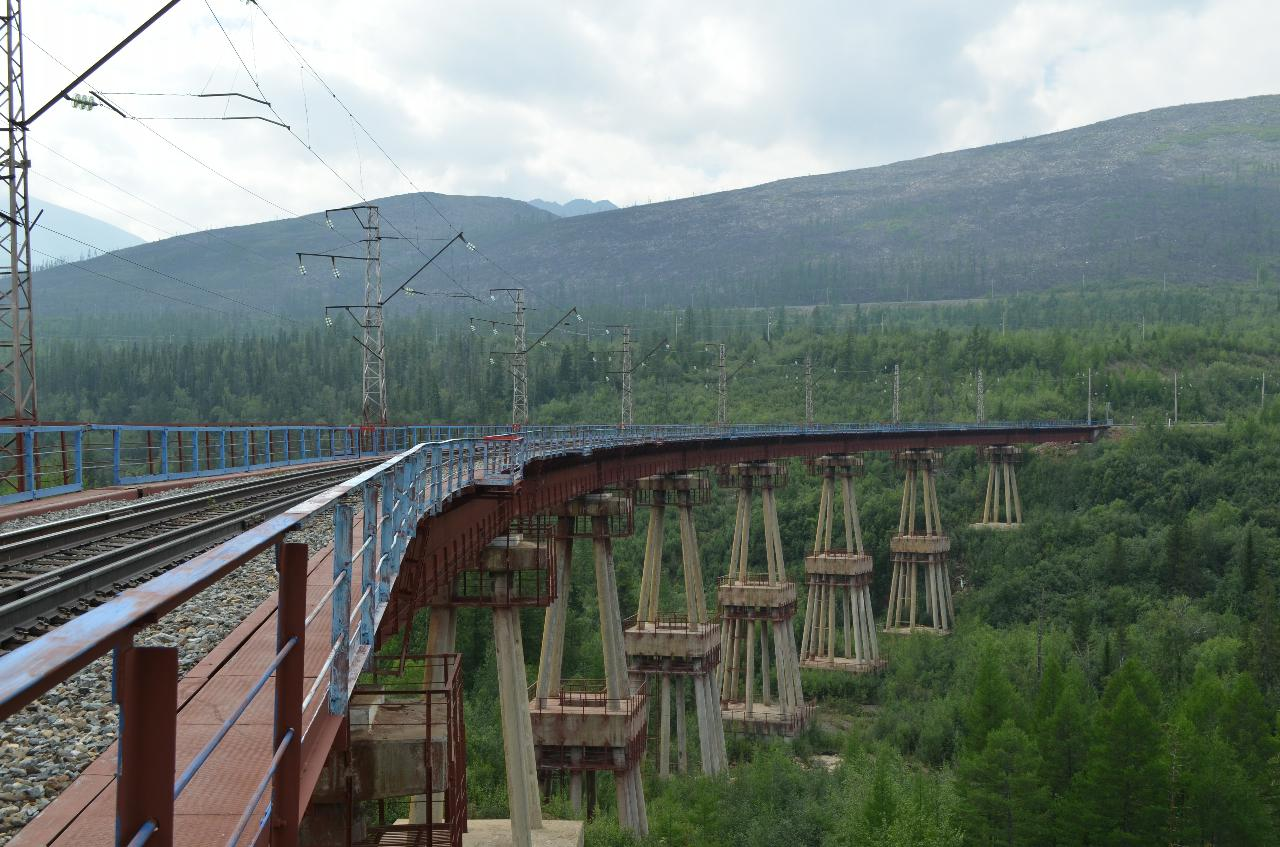 Чёртов мост (БАМ)